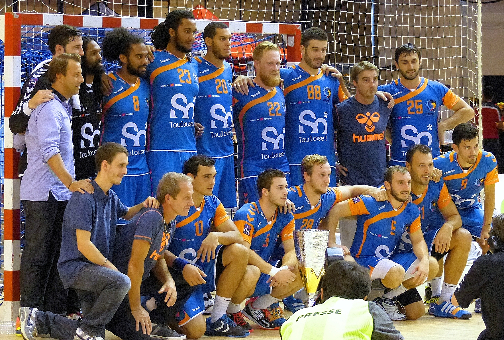 Fenix Toulouse Handball vainqueur du Challenge Marrane contre l'US Ivry. Le 31 août 2014 à la Halle Carpentier, Paris 13e.